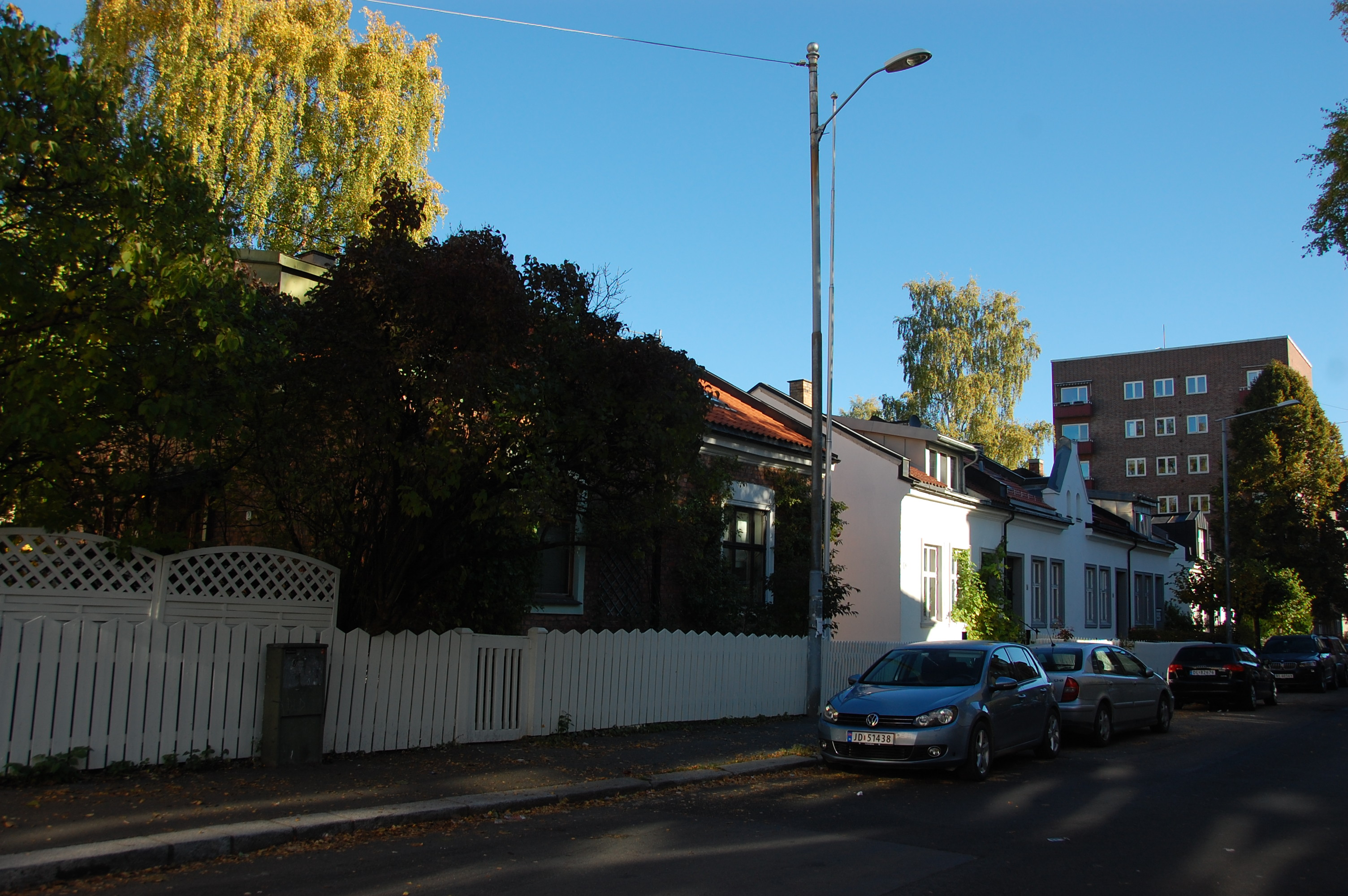 Hammergata på Sagene sett fra Maridalsveien. Den hvite boligrekken til venstre er nr.2-16, arbeiderboliger fra 1899 oppført av Effata Arbeiderforenings Byggeforbund.